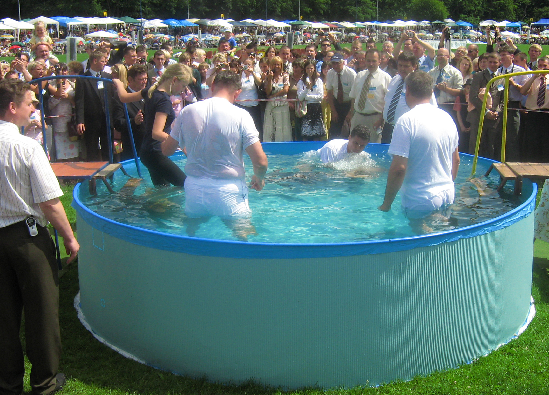 Chrzest na Świadków Jehowy. Zgromadzenie okręgowe w Szczecinie. 12 lipca 2008.